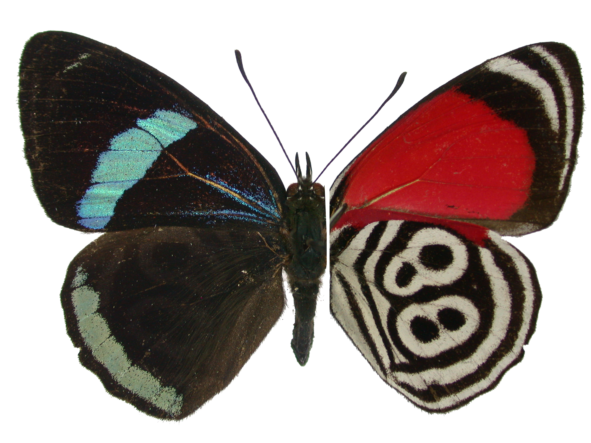 Nymphalidae Ecuador